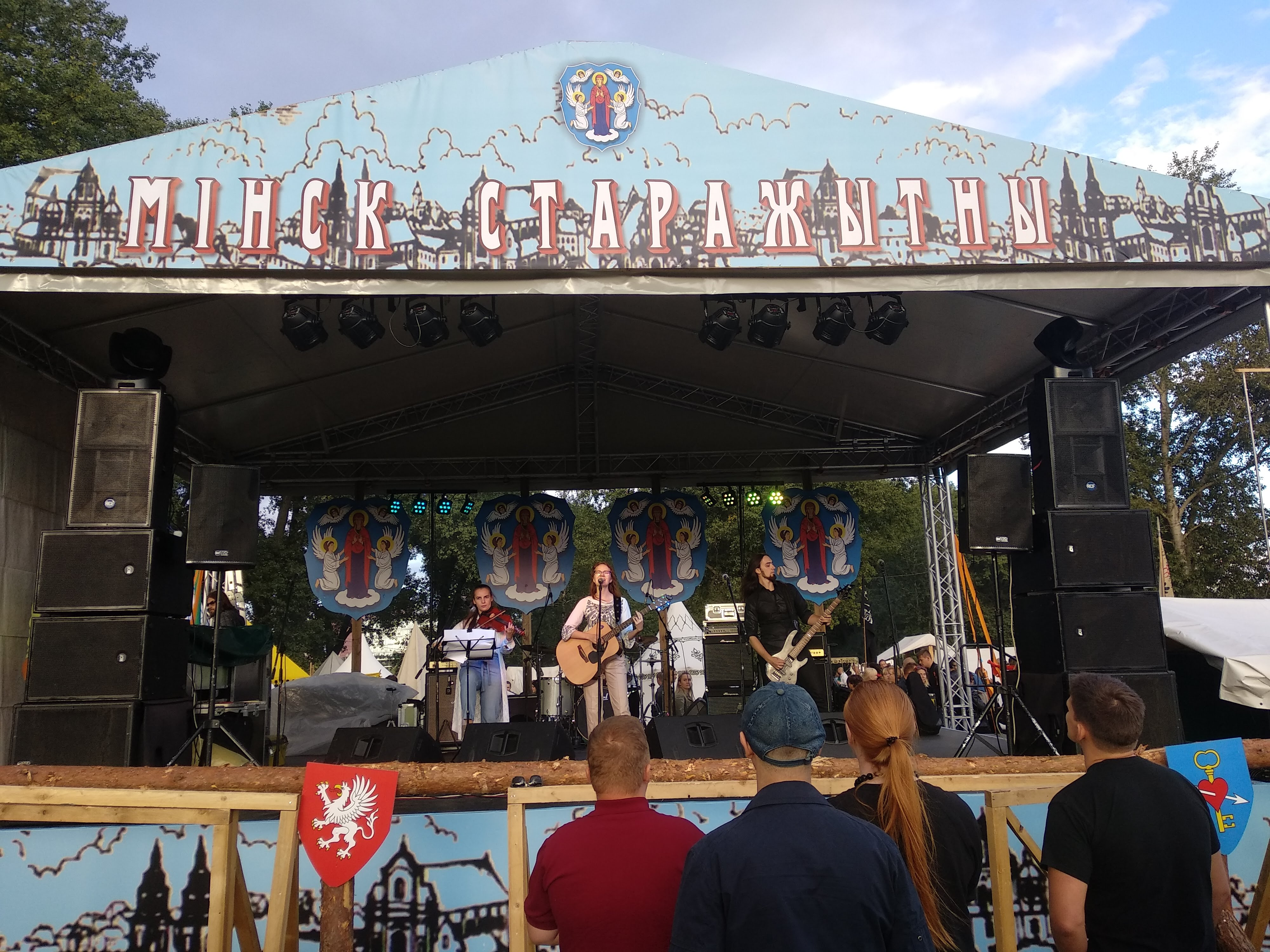 Гурт Няміга на фэсце Мінск Старажытны